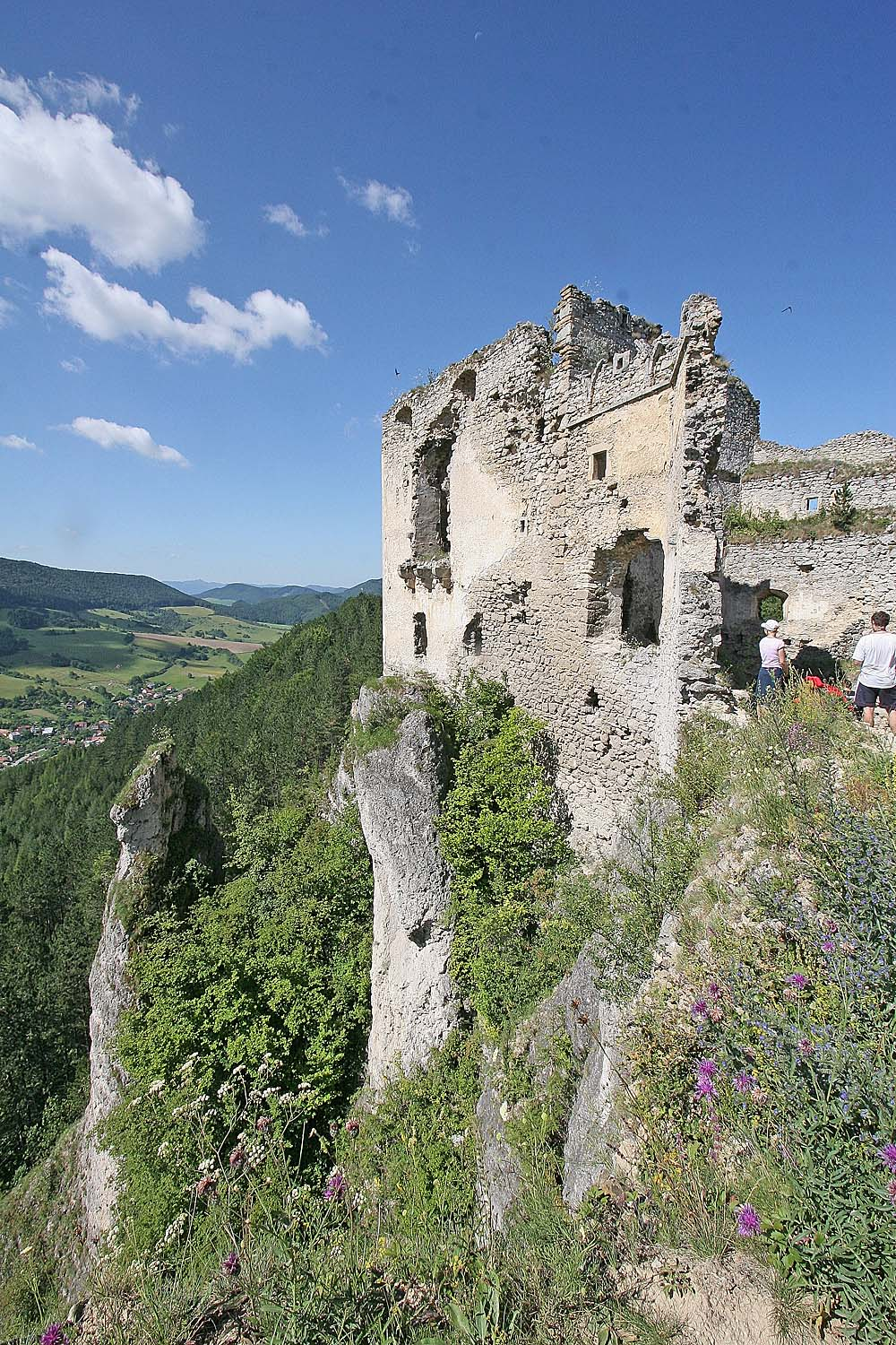 Castle Lietava - Kinižovský palác